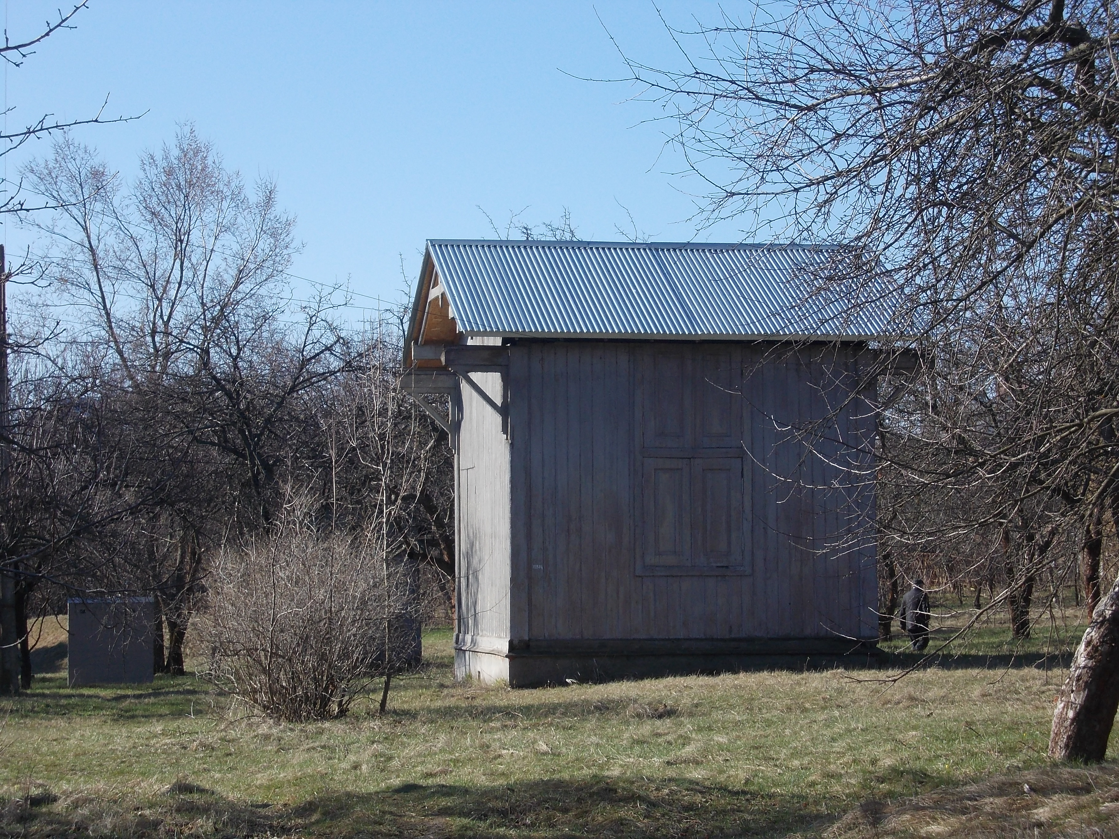 Місто Полтава. Територія Полтавської гравіметричної обсерваторії. Один із павільйонів, де проходять наукові дослідження.